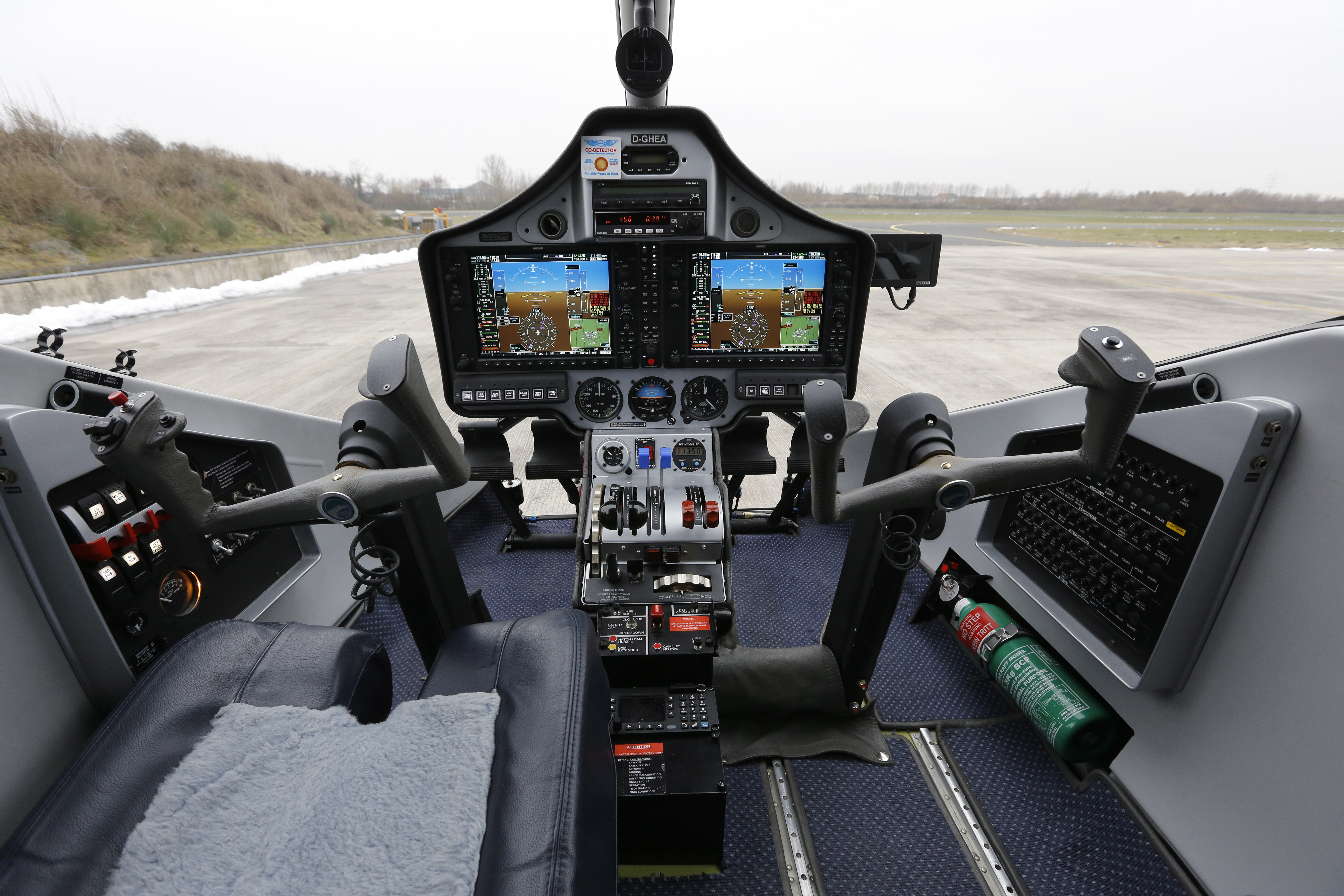 Vulcanair P68 Observer 2 als Polizeiflugzeug "Ibis 7" (D-GHEA) der hessischen Polizeifliegerstaffel am Flugplatz Egelsbach.